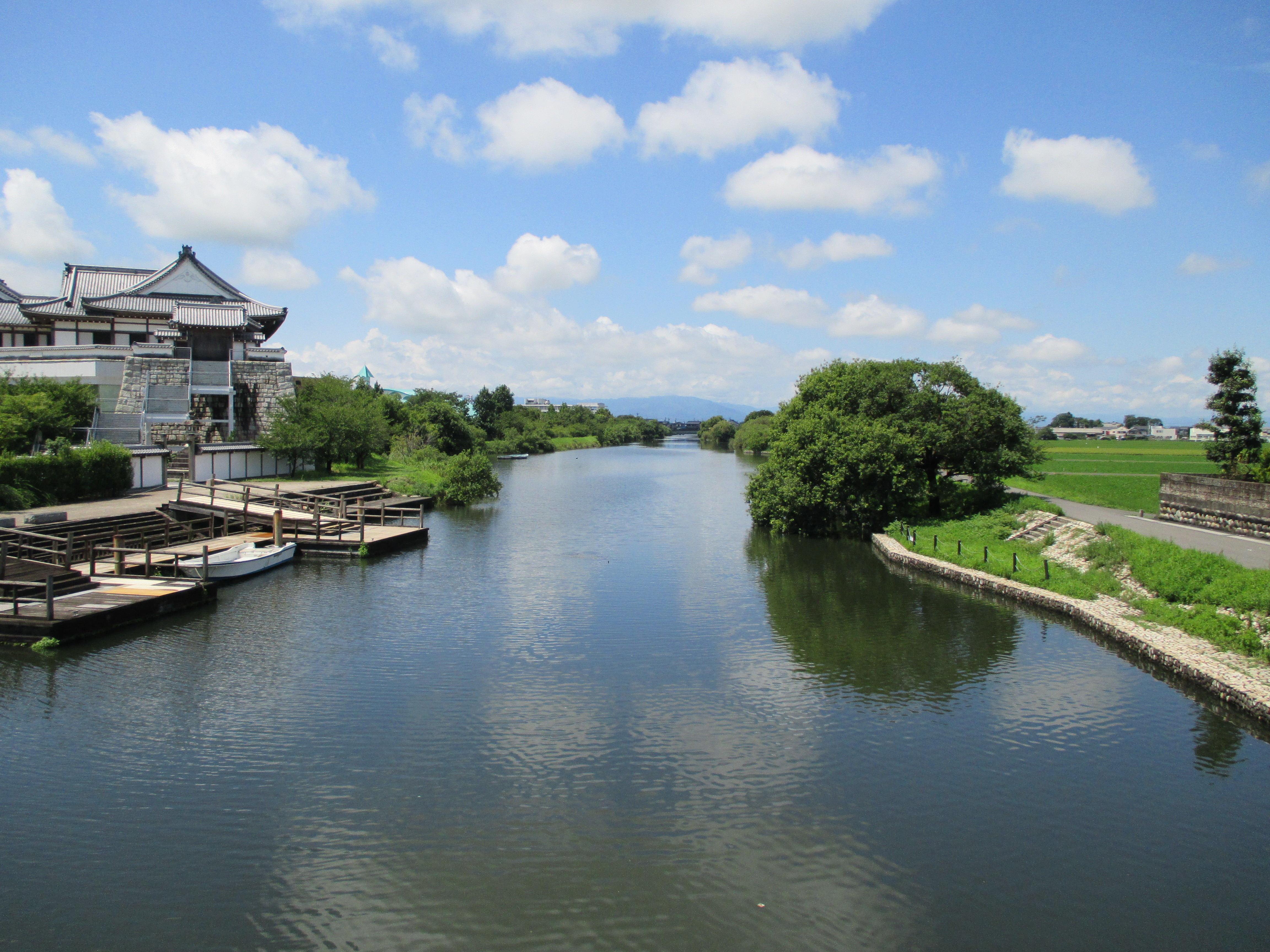 二軒家橋より北側を撮影